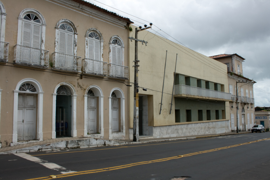 Antigo Prédio da Assembleia Legislativa do Maranhão localizado na Rua do Egito - Centro.